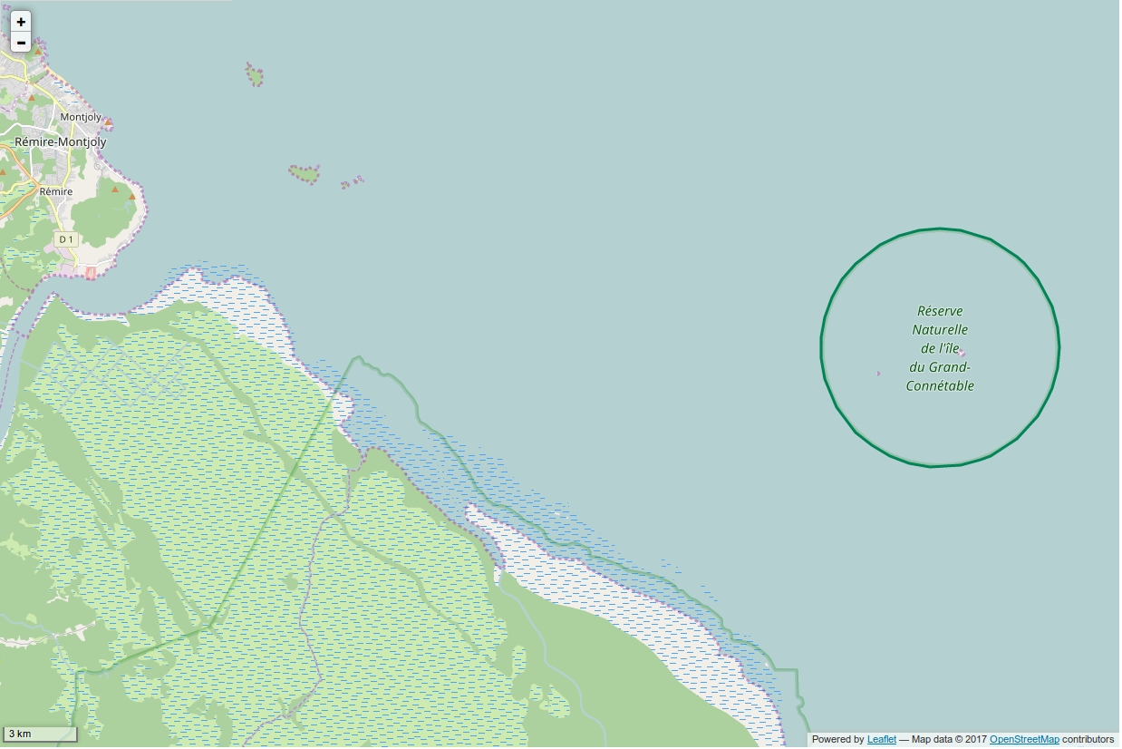 Périmètre de la RNN de l'Ile du Grand Connétable.